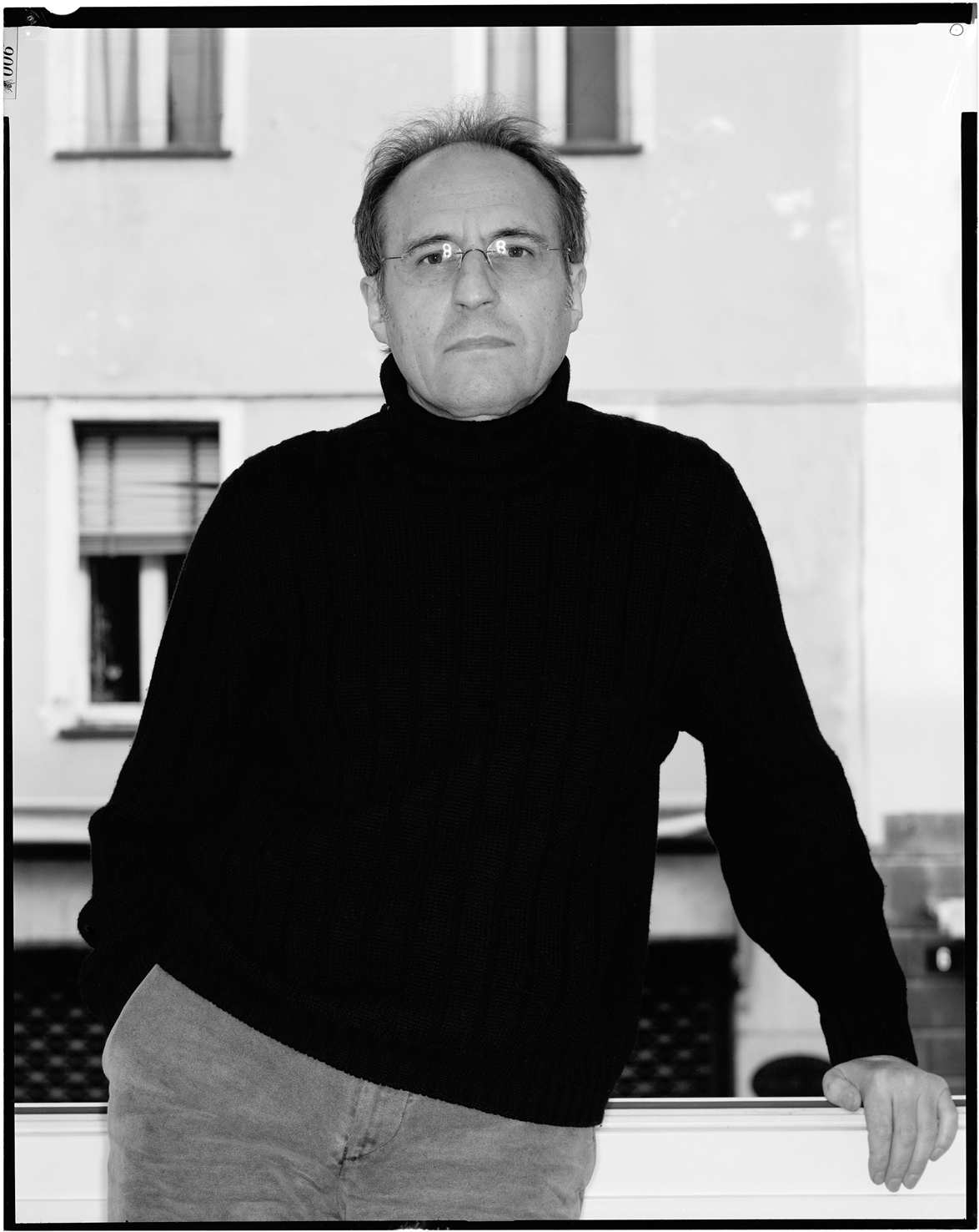 Autoritratto, 2006